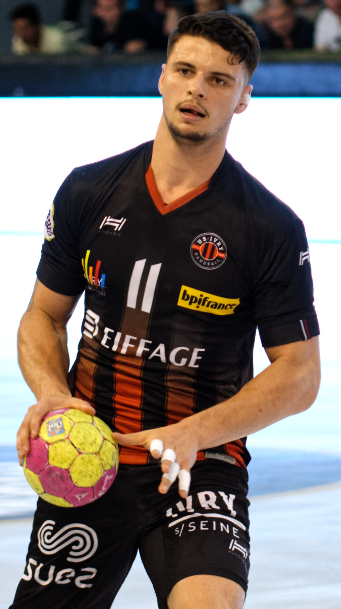 Rencontre de championnat de LidlStarLigue entre l'US Ivry et Toulouse. A Ivry, le 31 mai 2017.